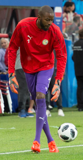 Польша неожиданно проиграла Сенегалу